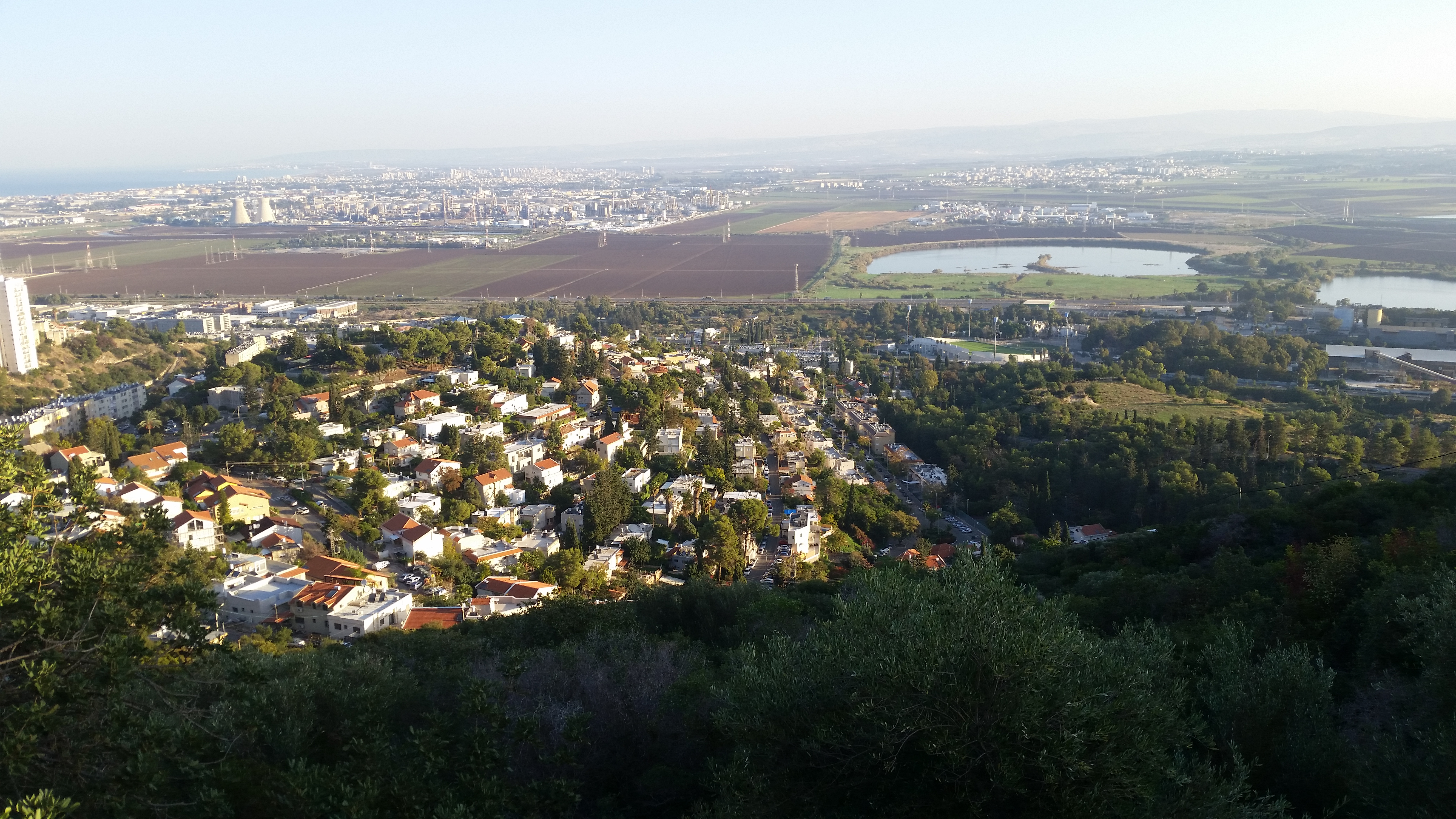 מבט על שכונת גבעת נשר משמאל, מכביש 7212 העולה מנשר לאוניברסיטה. מימין מול גבעת נשר, נמצאת גבעת העמדות מתחם בונקרים ועמדות תותחים מתקופת המנדט הבריטי.